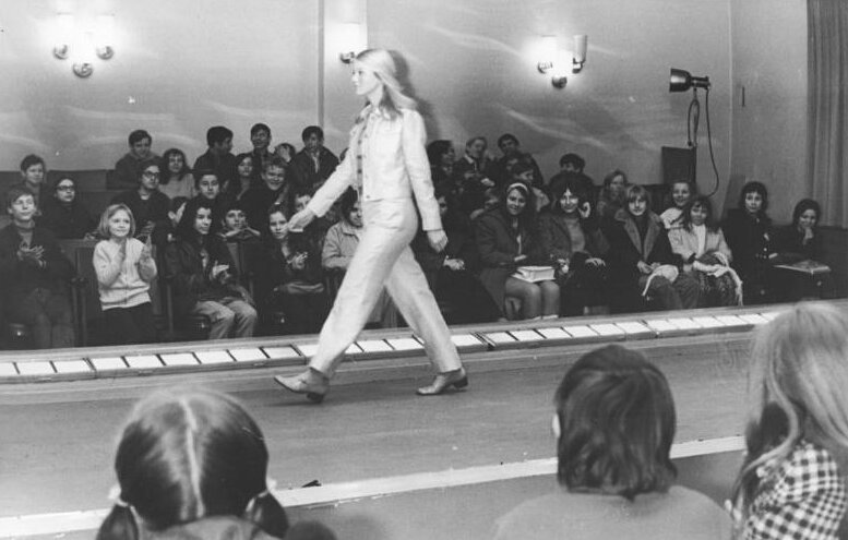 Berlin, Jugendstunde im Deutschen Modeinstitut ADN-ZB Spremberg 25-1-1972 Berlin: Berlin: Jugendweihteilnehmer besuchten Deutsches Modeinstitut-Herbst- und Winterkollektion des Jahres 1973 stellte das Deutsche Modeinstitut seinen jungen Gästen am 25.1.1972 in einer kleinen Modeschau vor. In Vorbereitung auf ihre Jugendweihe besuchten die Schüler aus 5 Berliner Schulen das Berliner Institut und informierten sich über dessen Arbeit.